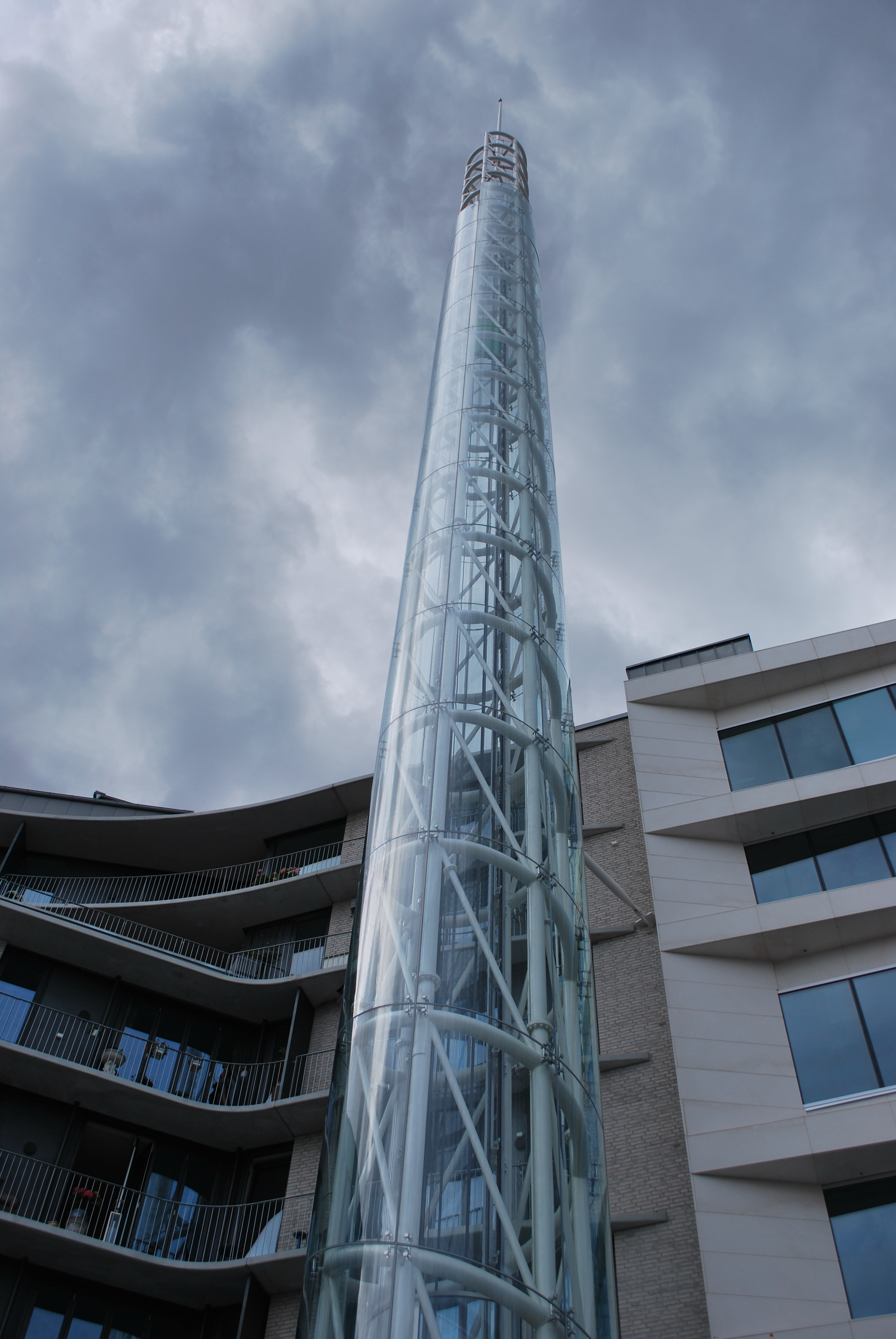 Tjuvtitten, utsiktstårn på Albert Nordengens plass, Holmen, Tjuvholmen, Oslo